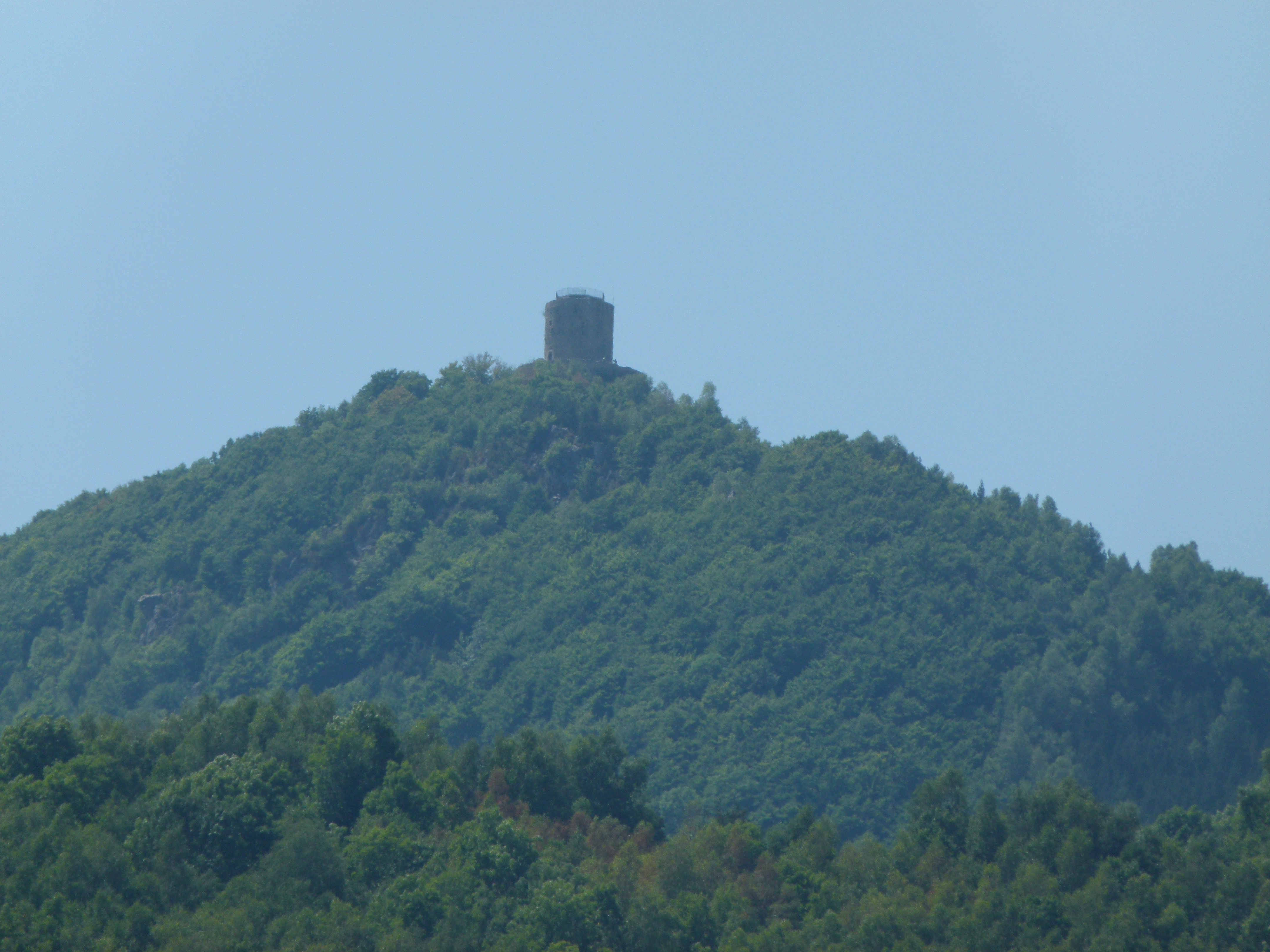 Torre del Mir (Prats de Molló i la Presta) .